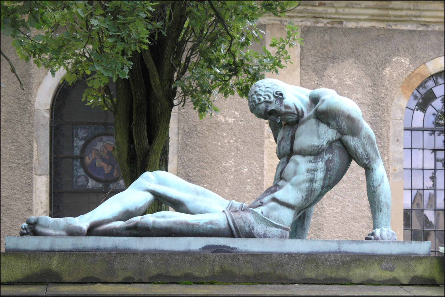 František Opitz - raněný (socha věnovaná památce padlých v 1. světové válce, v areálu kostela sv. Bartoloměje ve Velkém Šenově